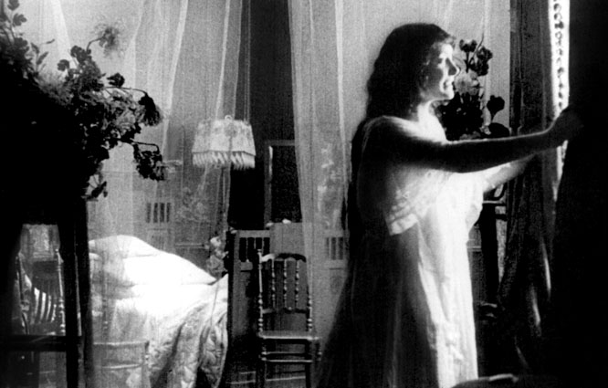 кадр из фильма «Сумерки женской души» (1913)